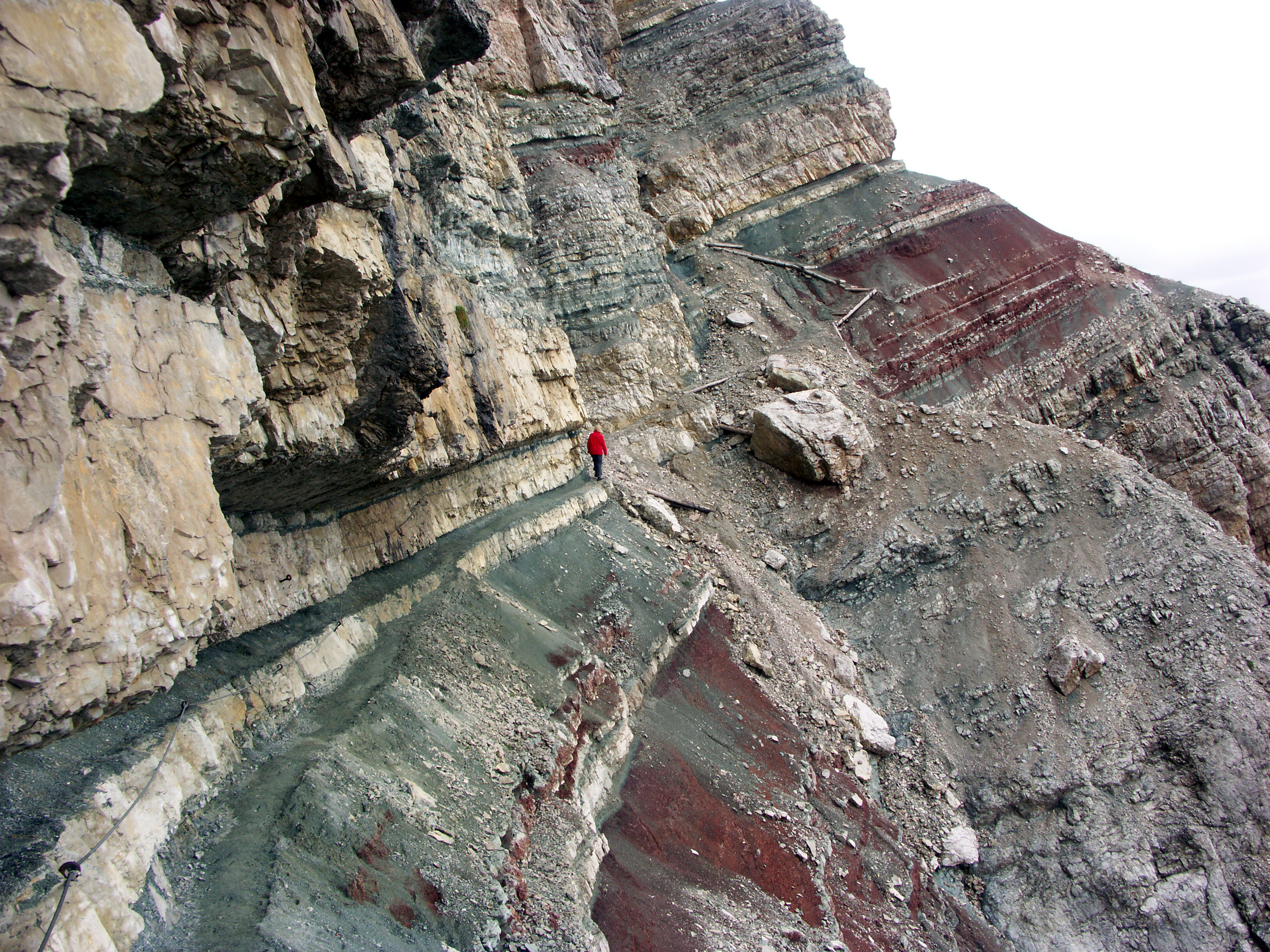 Italien, Südtirol, Dolomiten, Auf dem Sentiero Astaldi in den Ampezzaner Alpen unterhalb der Punta Anna